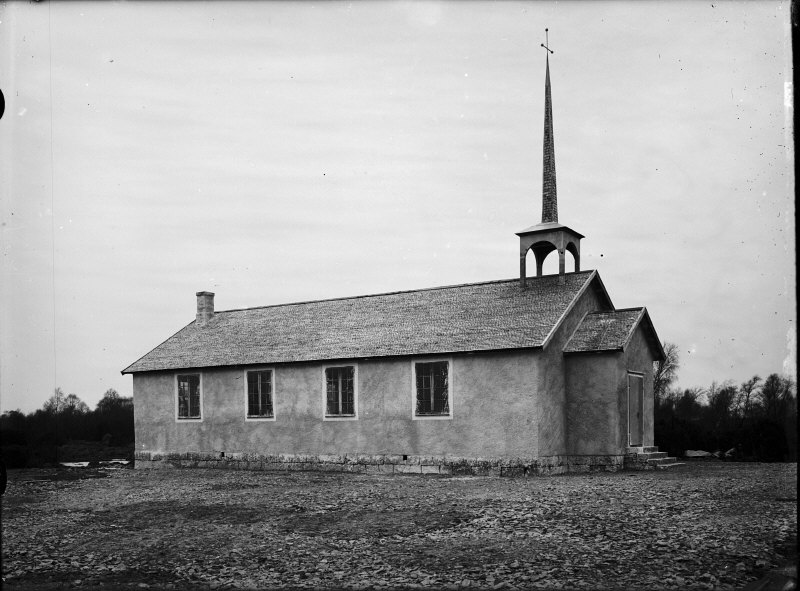 Tjurkö kyrka